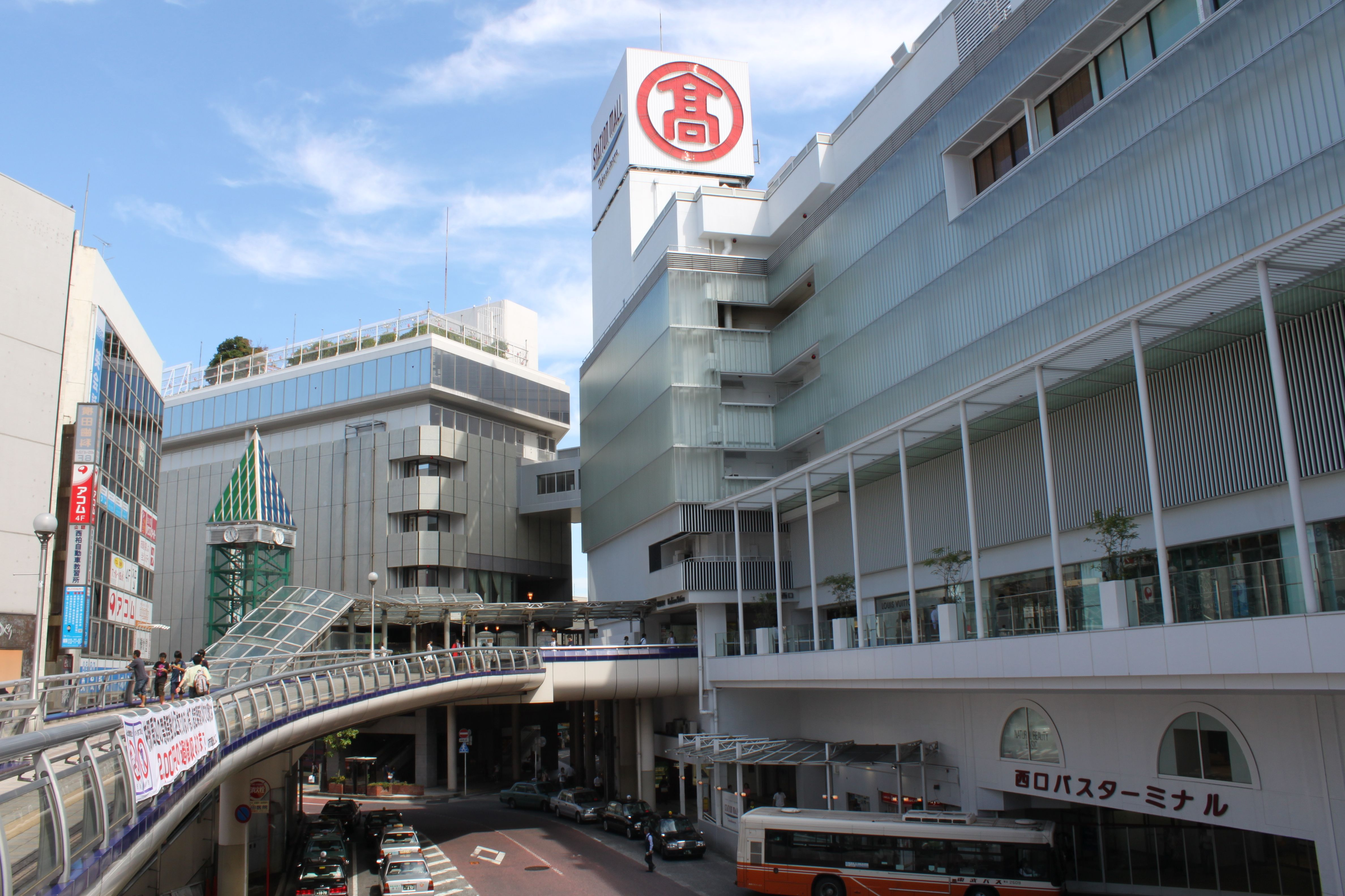 柏駅